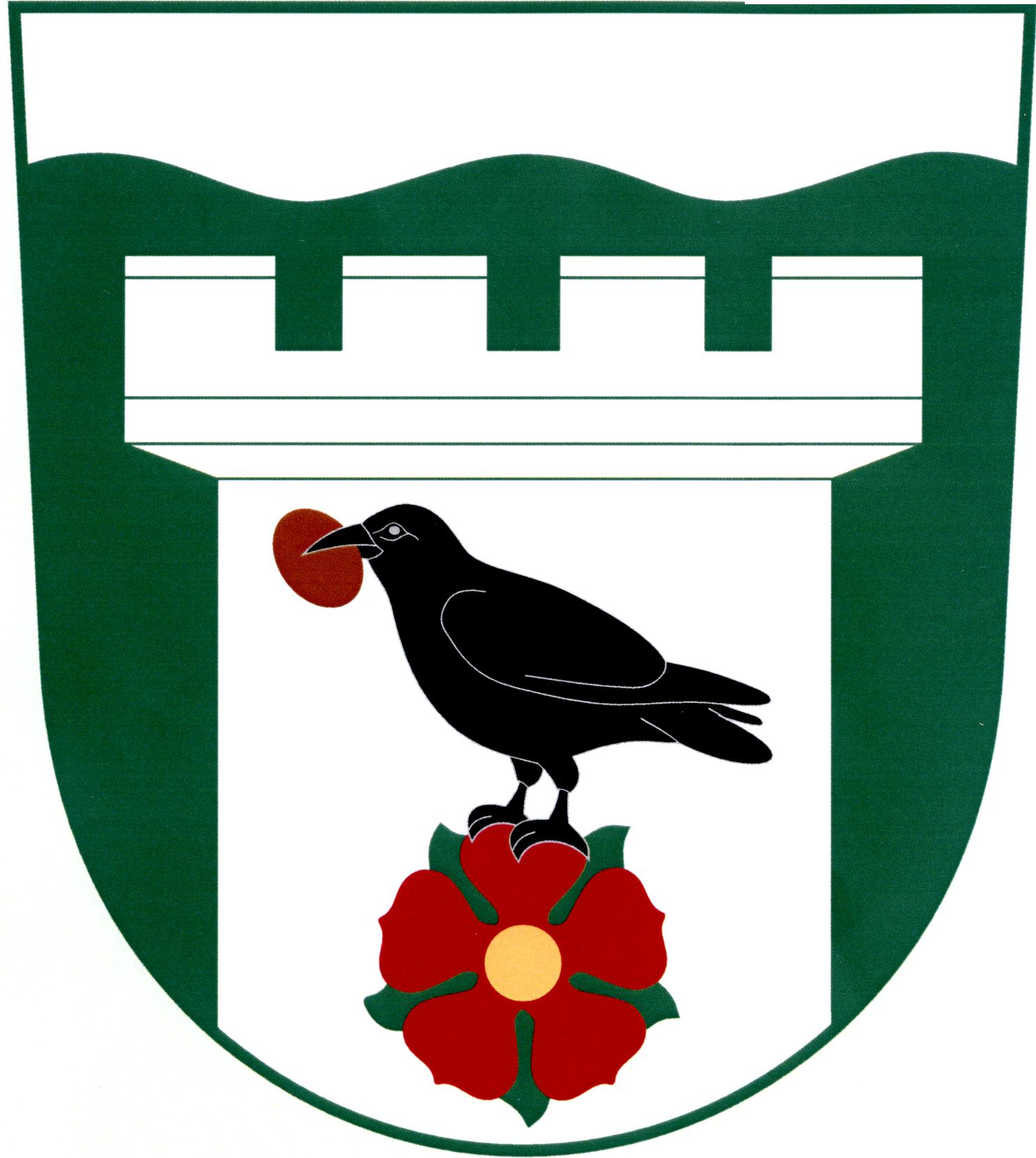 Znak obce Přední Výtoň